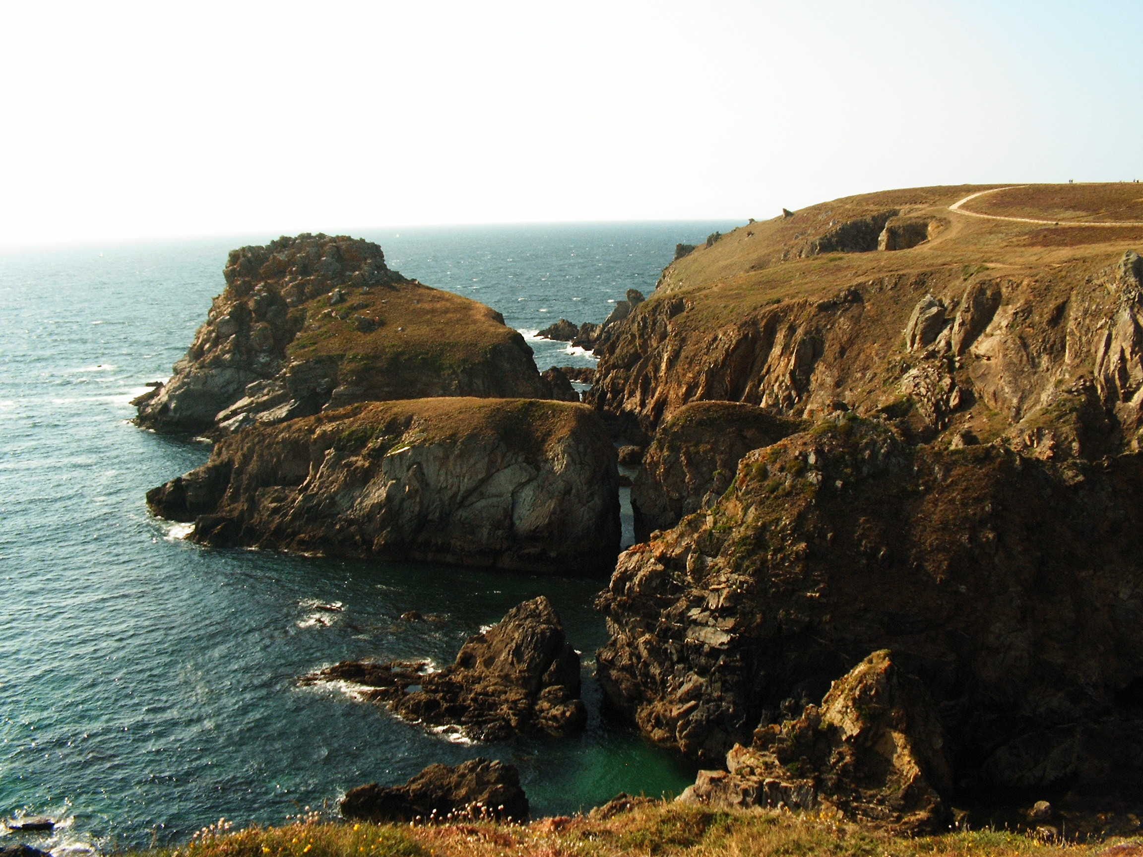 Felsinseln vor der Pointe du Van in der Bretagne